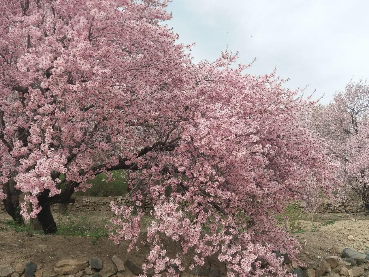 شروع فصل بهار سال ۱۳۹۷ در روستای جزه